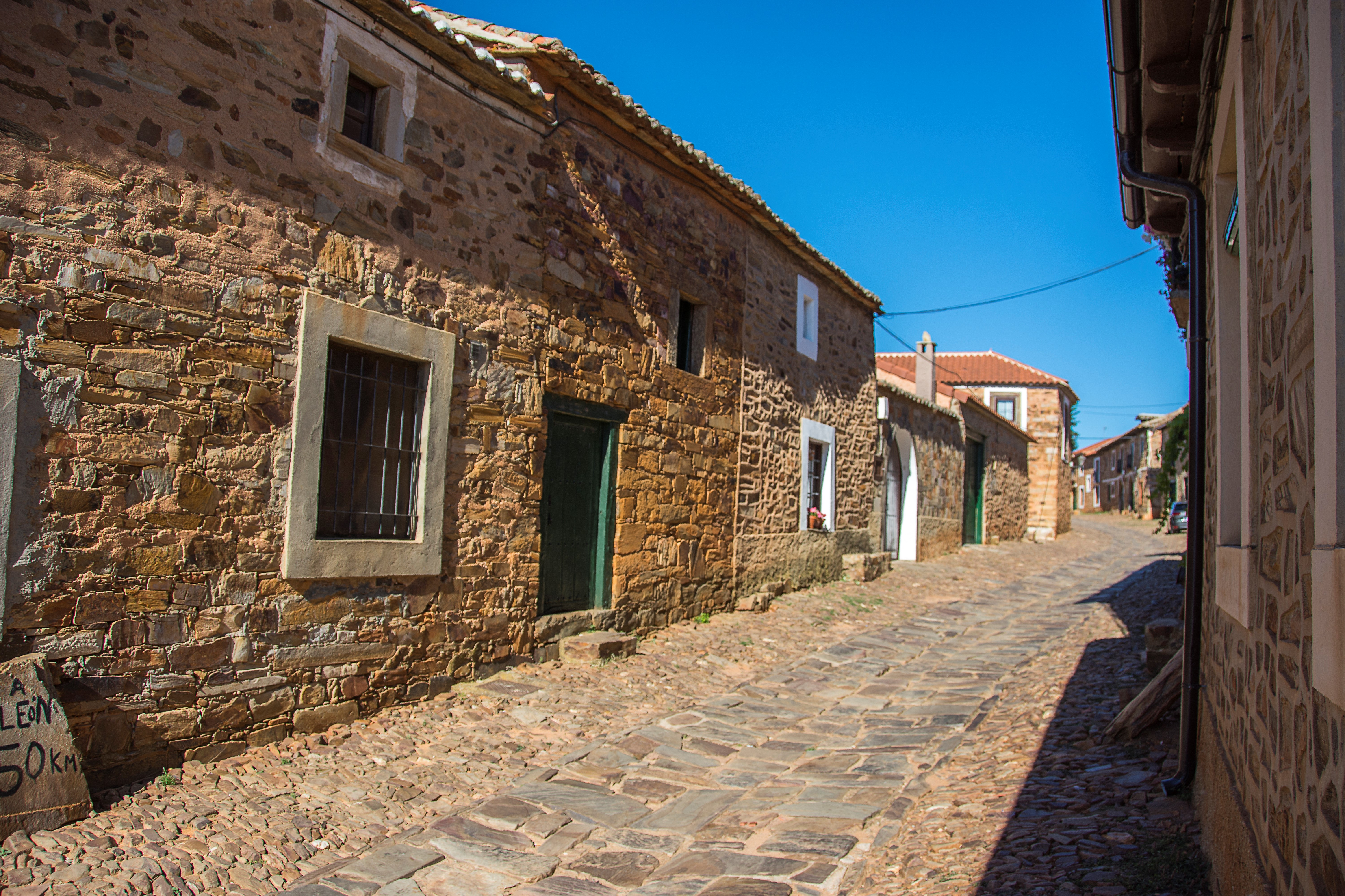 Vista de la población de Castrillo de los Polvazares, en la comarca de la Maragatería.